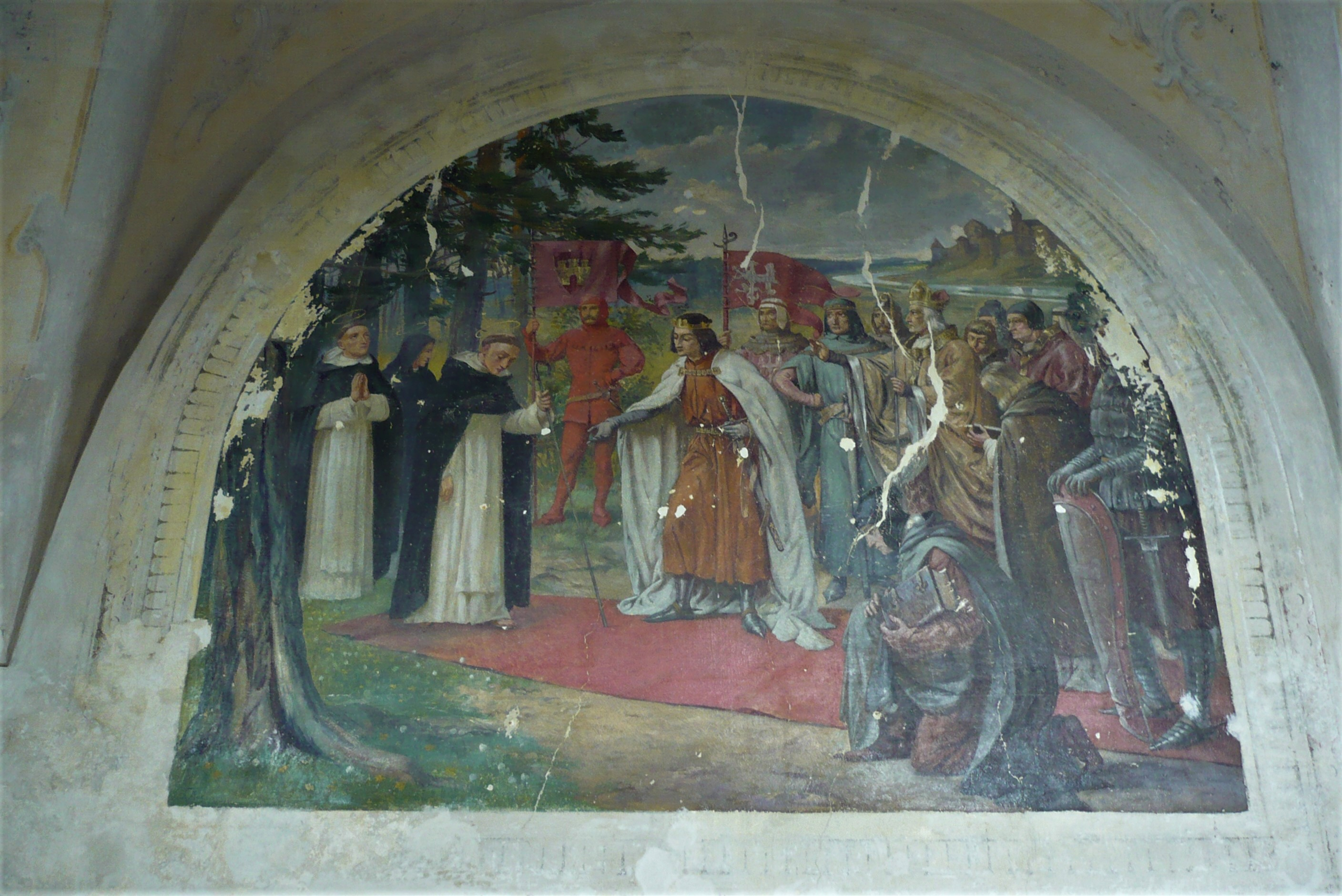 Klasztor dominikanów we Lwowie. Malowidło ścienne